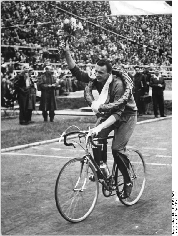 Jan Kubr Zentralbild Kronfeld 6.5.1955 - 2. Etappe der Friedensfahrt von Kolin nach Brno über 185 km. UBz: der glückstrahlende Etappensieger Jan Kubr (CSR) auf der Ehrenrunde.